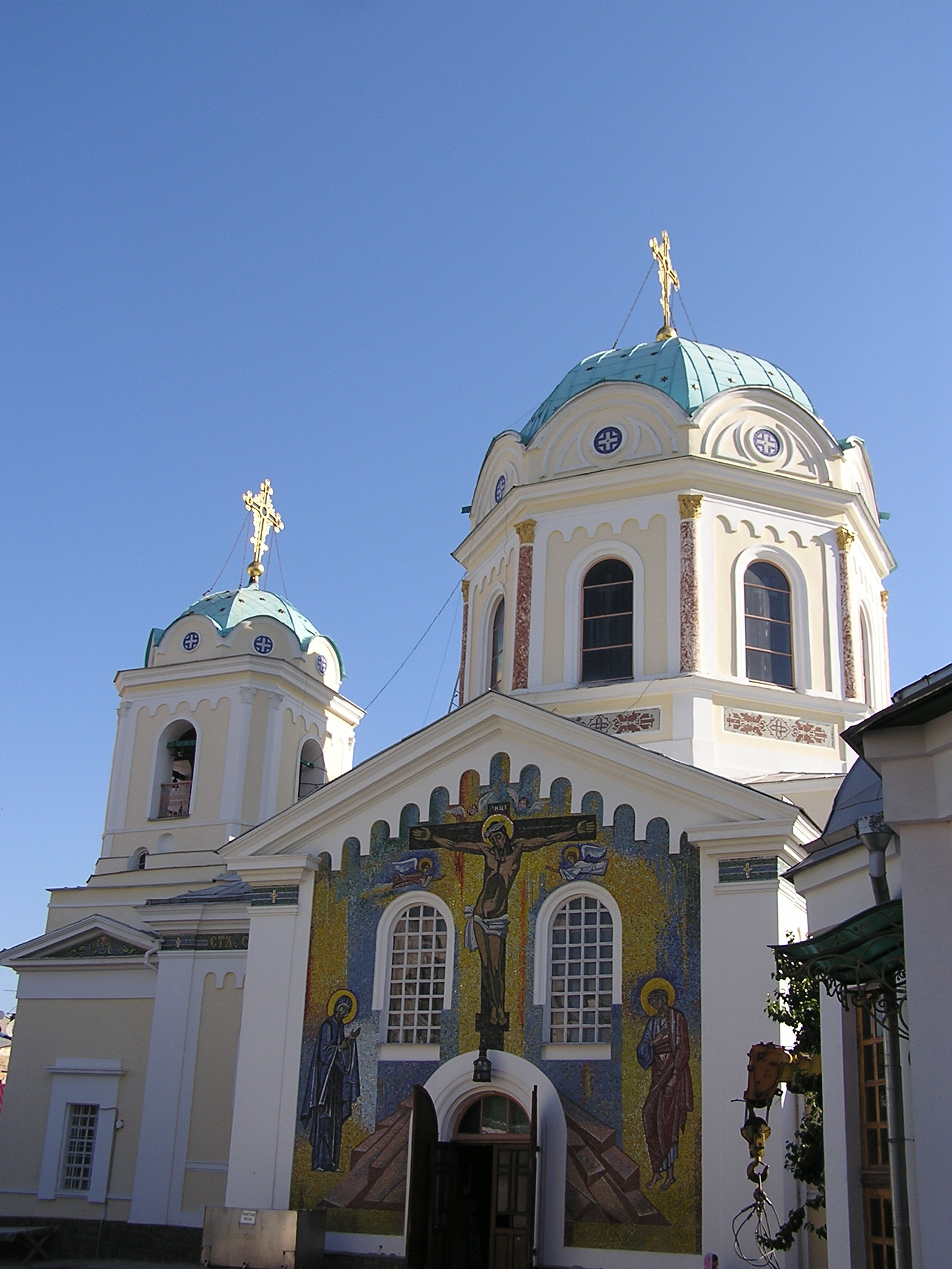 Симферополь. Свято-Троицкий собор